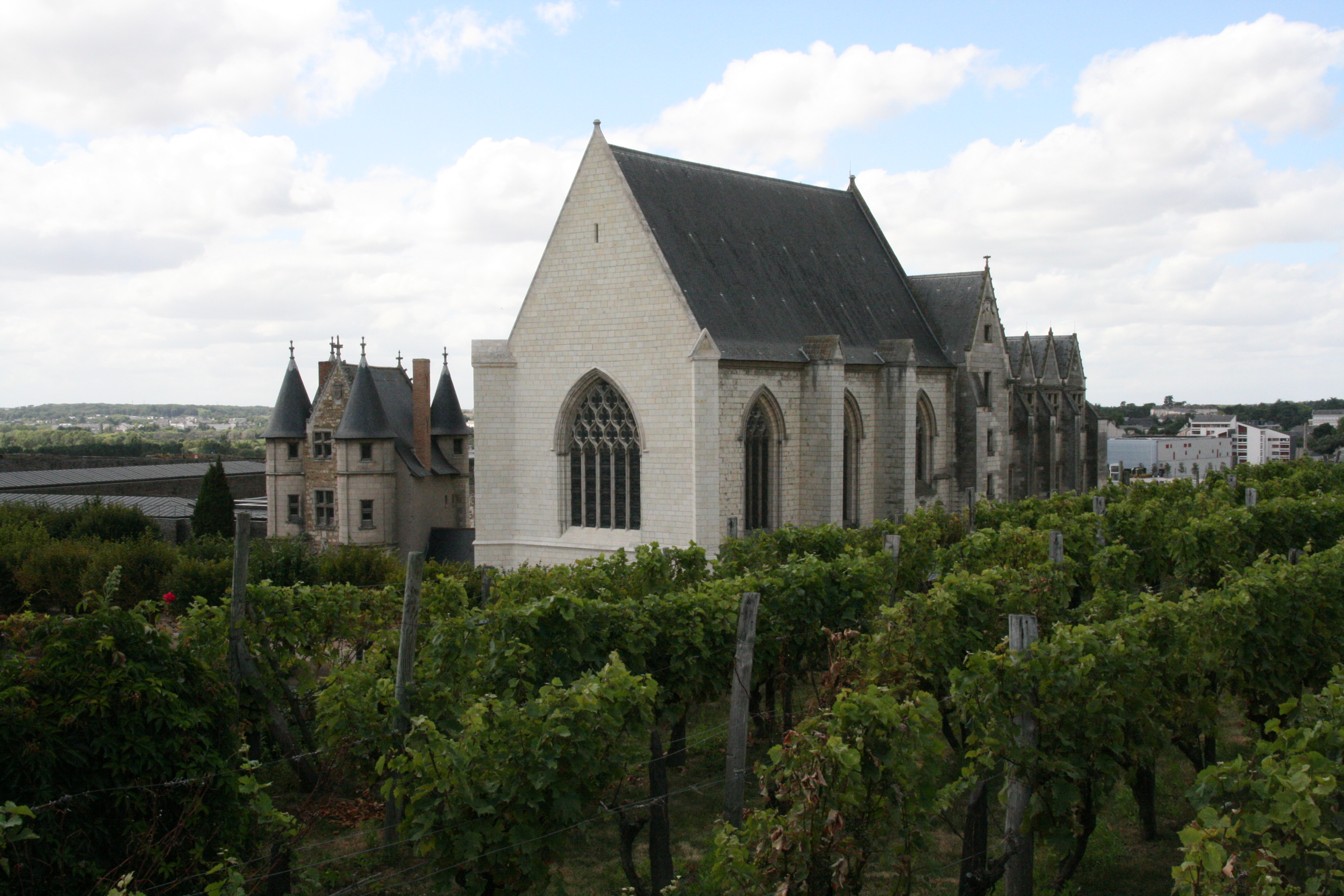 Vue du château d'Angers (France) depuis les remparts. Au premier plan, les vignes ; au second plan de gauche à droite, le châtelet, la chapelle, le logis royal (dans le prolongement de la chapelle).